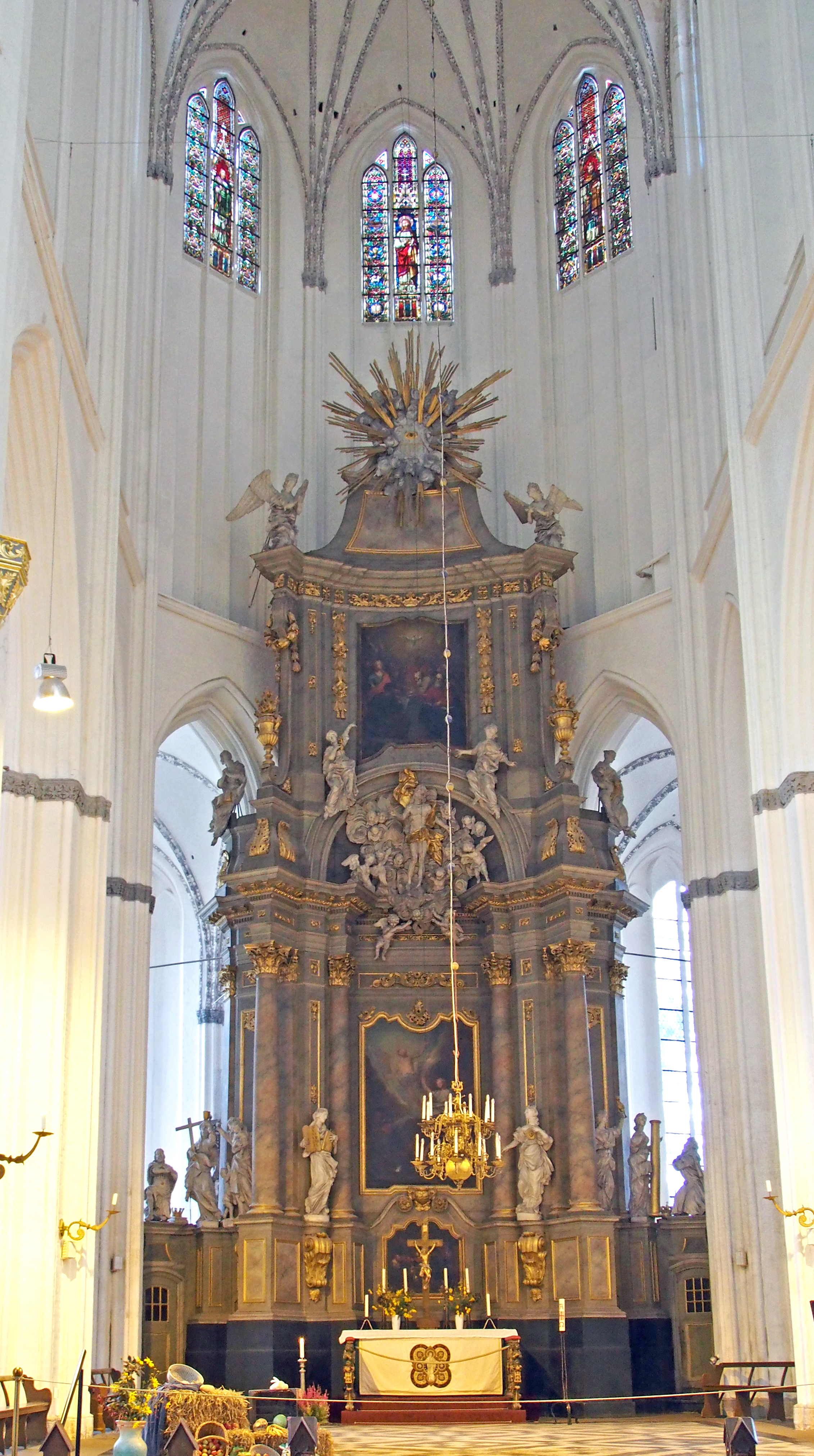 St. Marienkirche Rostock, Barocker Hauptaltar von 1721